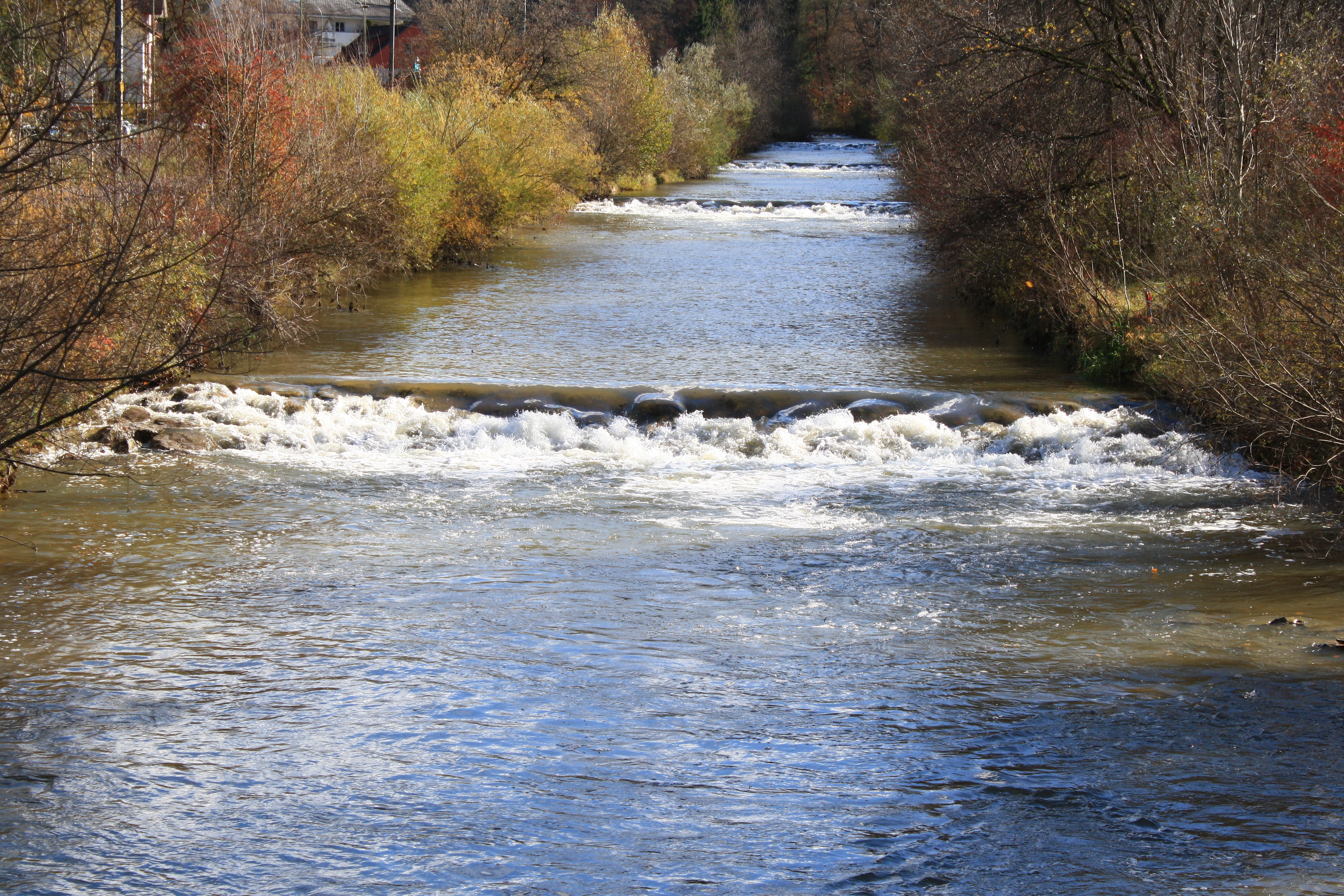 Töss river in Rikon in the Töss Valley (Tösstal) in Switzerland